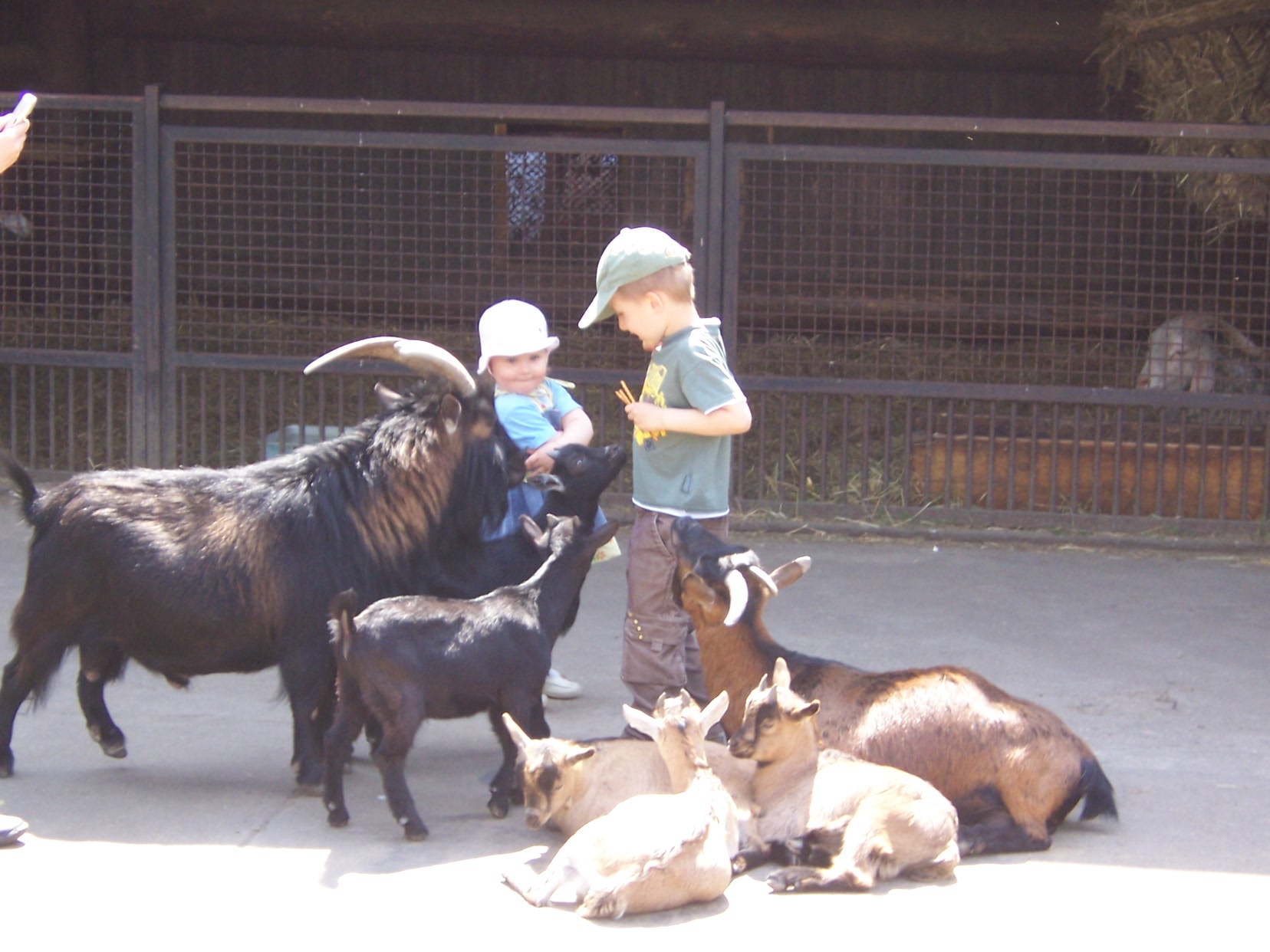 Dzieciniec zwierzęcy we Wrocławskim ZOO gdzie dzieci mają bezpośredni kontakt ze zwierzętami.